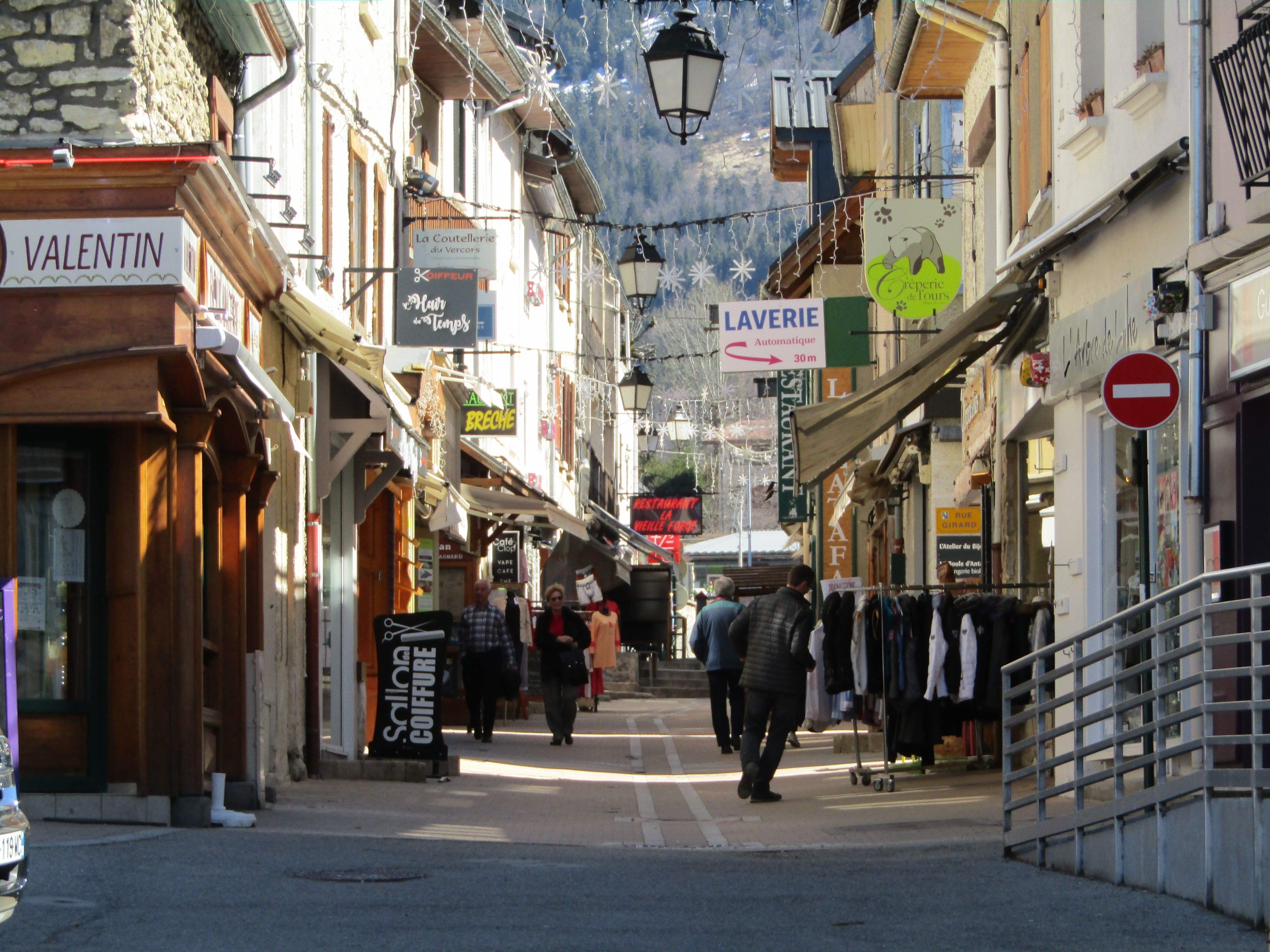 rue piétonne de Villard-de-Lans en mars2019